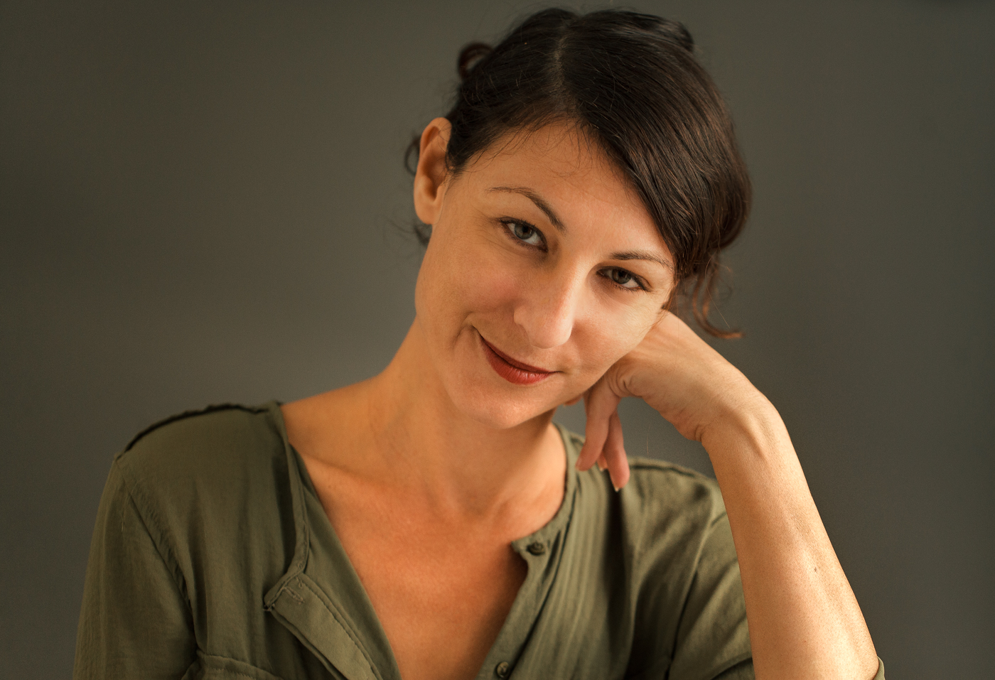 טל ברנר